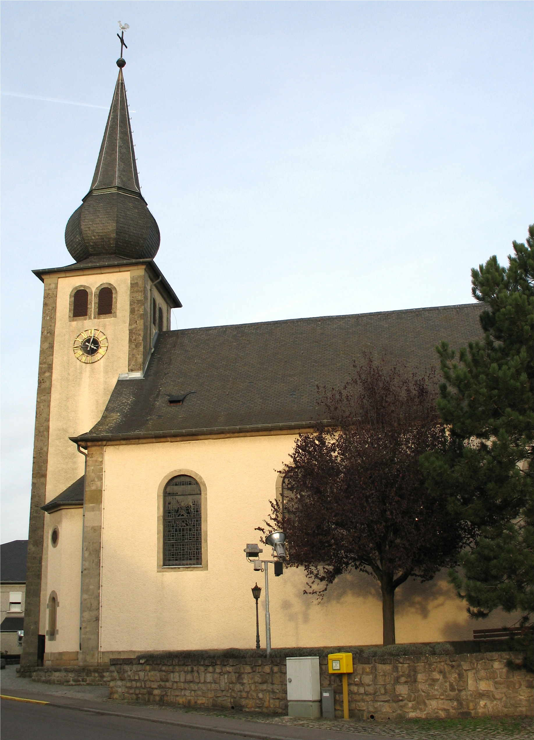 L'église de Moutfort (Luxembourg)